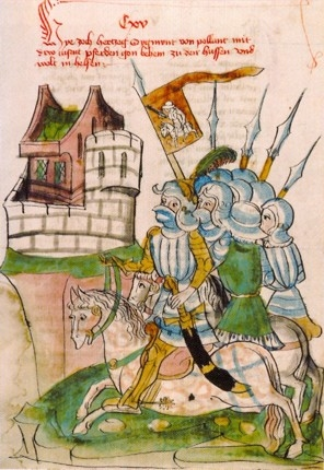 Беларуская (тарашкевіца): Жыгімонт Карыбутавіч